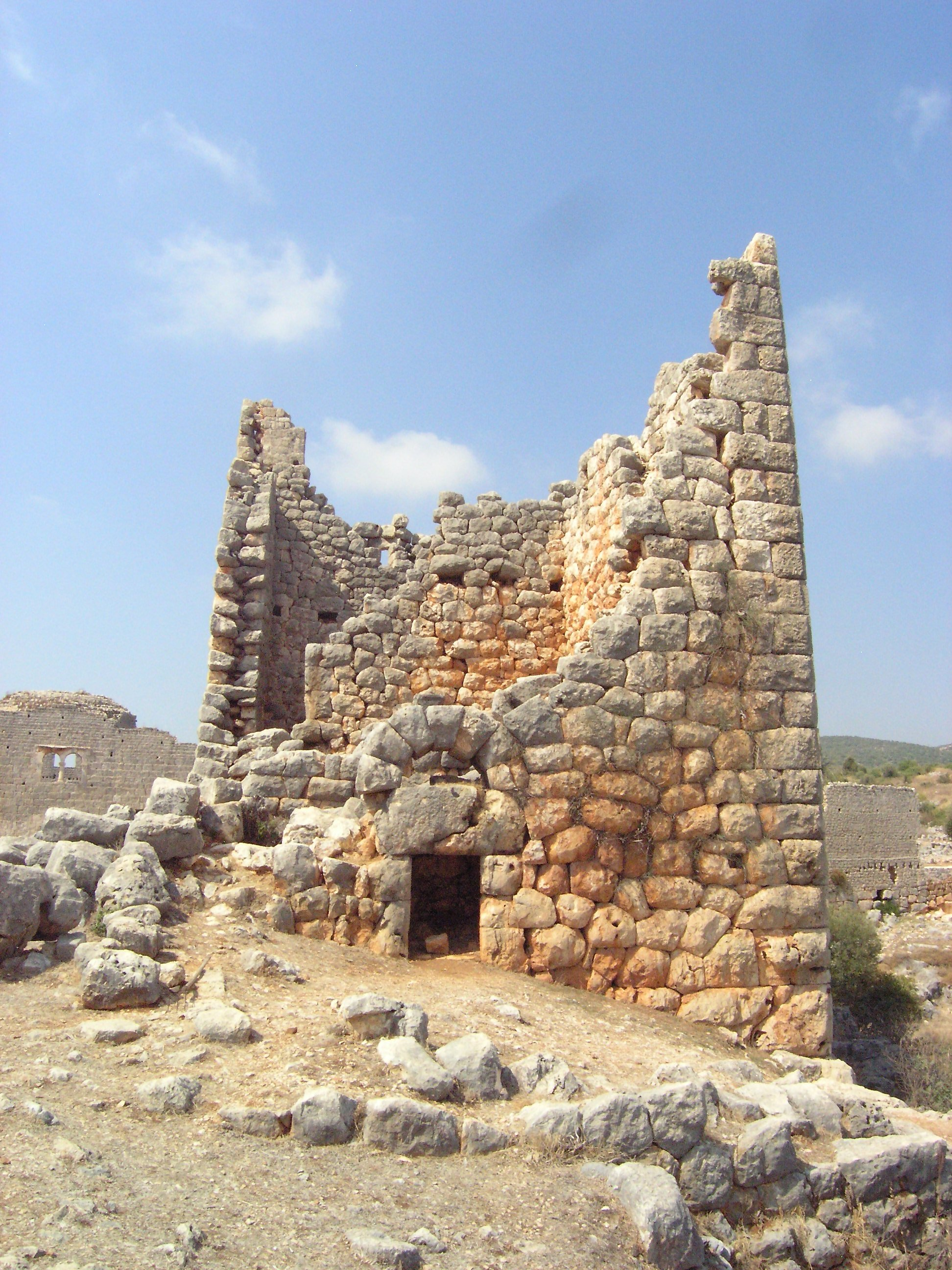 Kanytelleis (türkisch Kanlıdivane), hellenistischer Wehr- und Wohnturm